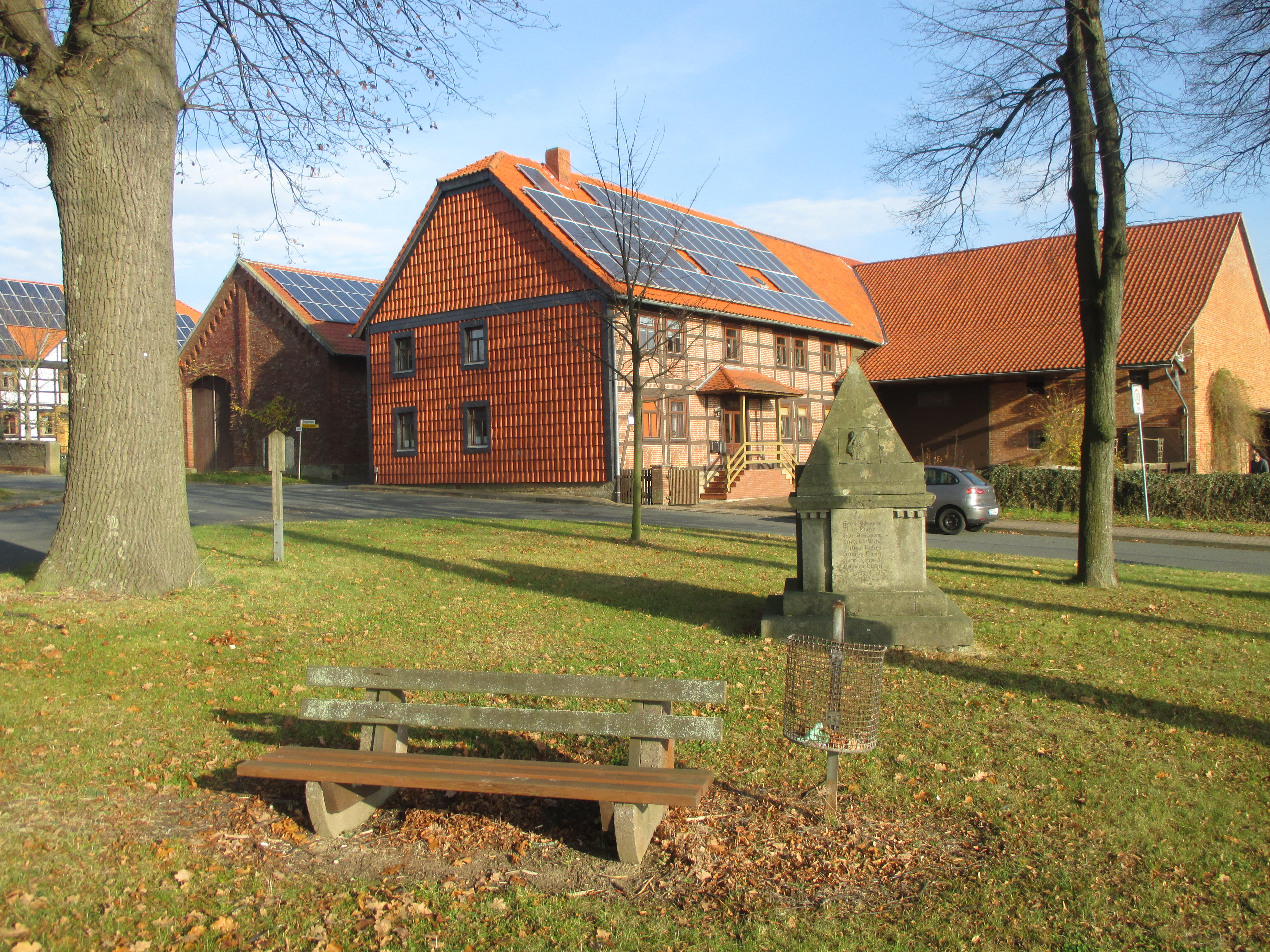 südwestlicher Ortseingang von Groß Elbe mit Kriegerdenkmal, Gemeinde Elbe, Landkreis Wolfenbüttel